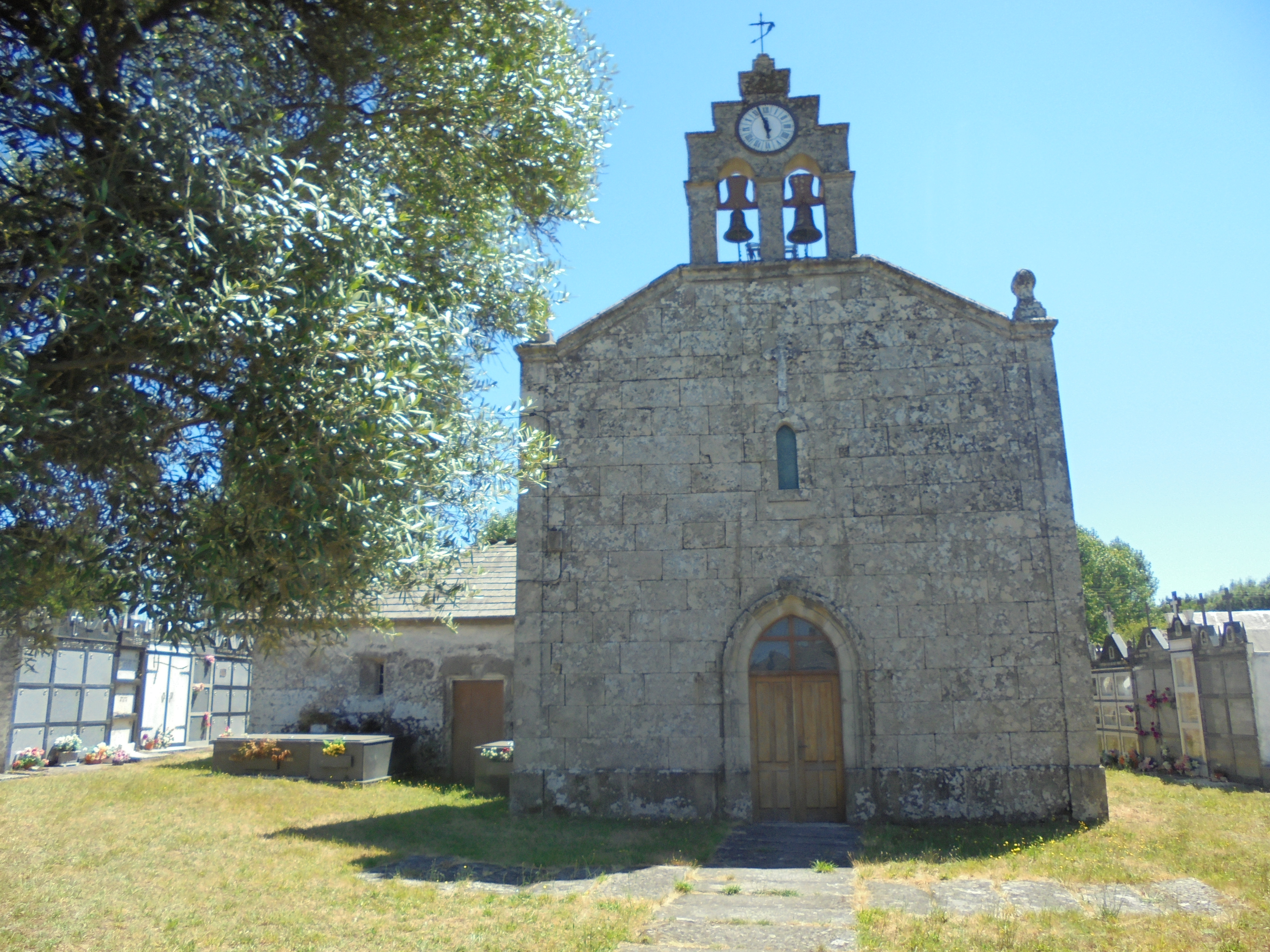 Igrexa parroquial de Santa María de Alta ( Lugo)